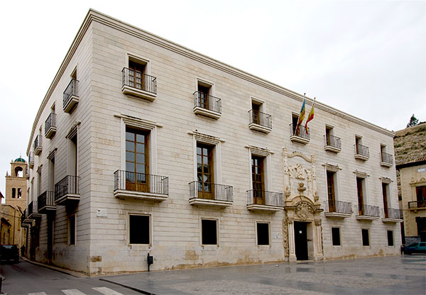 Palau del Comte de Pinohermoso, actualment Biblioteca Pública i Arxiu Històric Fernando de Loaces.